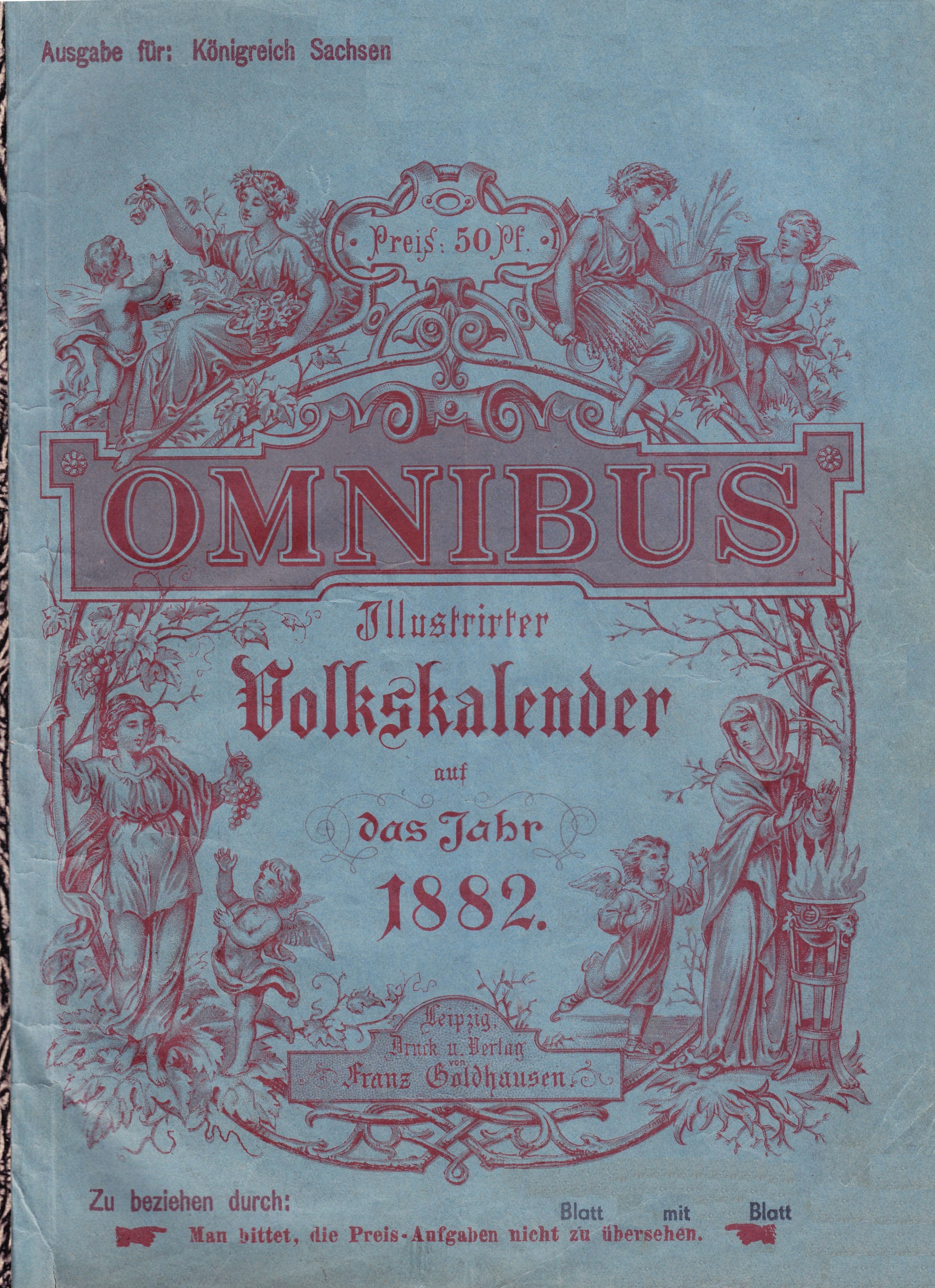 Titelseite des "Omnibus Illustrirter Volkskalender" von 1882